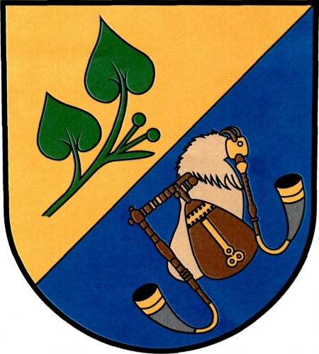 znak, Únice, okres Strakonice